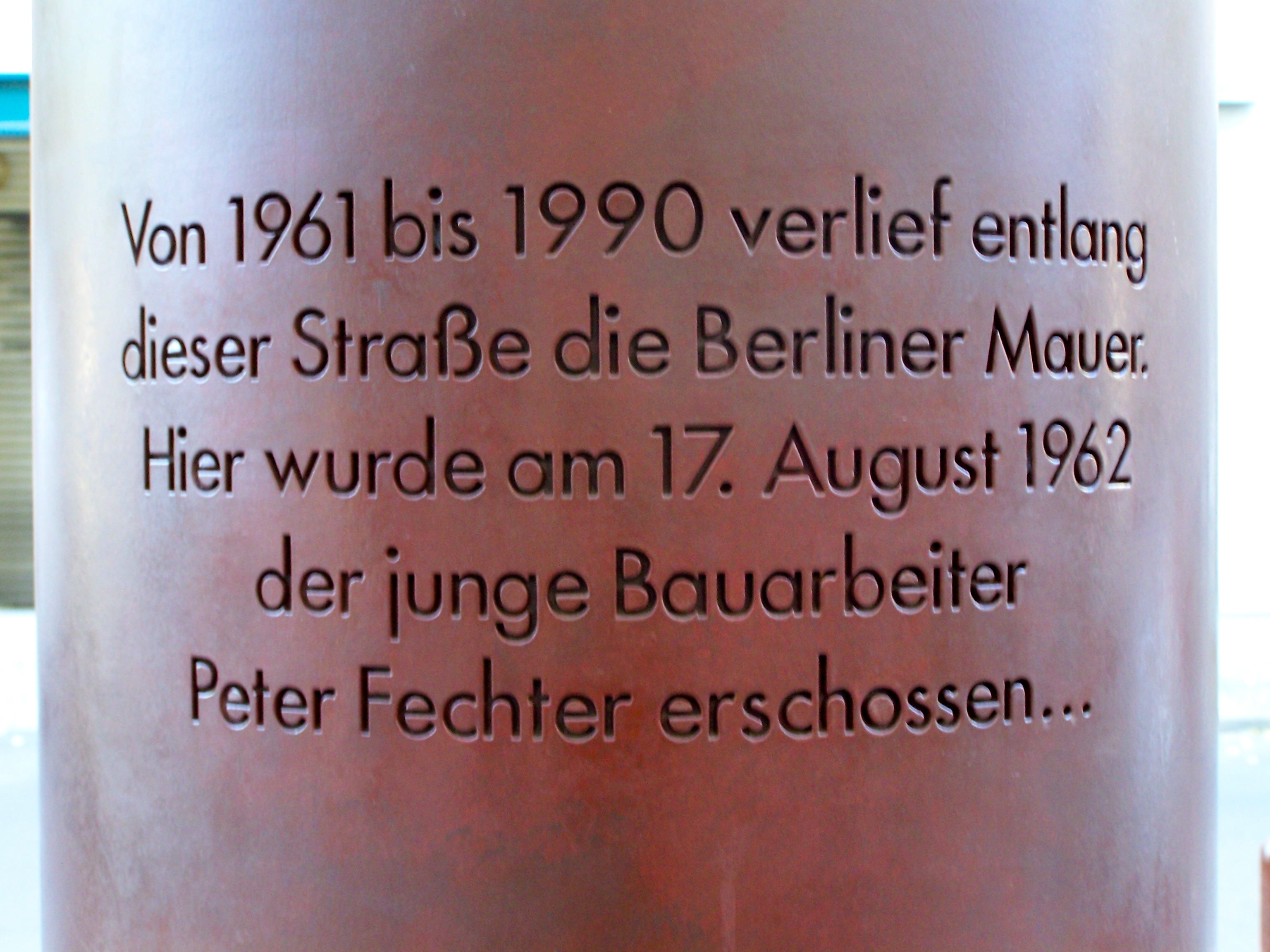 Inschrift auf der Rückseite des Peter Fechter Mahnmals in der Zimmerstraße, Berlin.